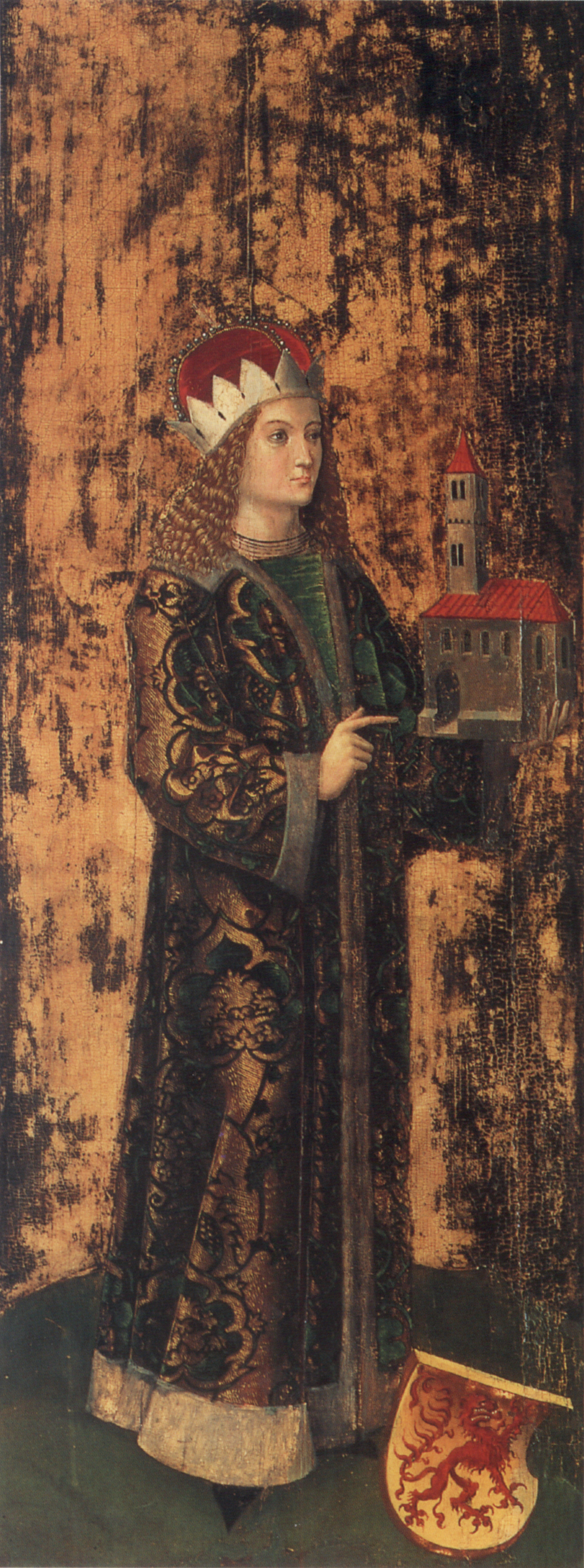 Weingartener Heilig-Blut-Tafel von 1489. Landesmuseum Württemberg, Stuttgart. Welf IV. (ehemals Außenseite des linken Seitenflügels des Flügelaltars, heute abgespalten und als Tafebild gehängt)